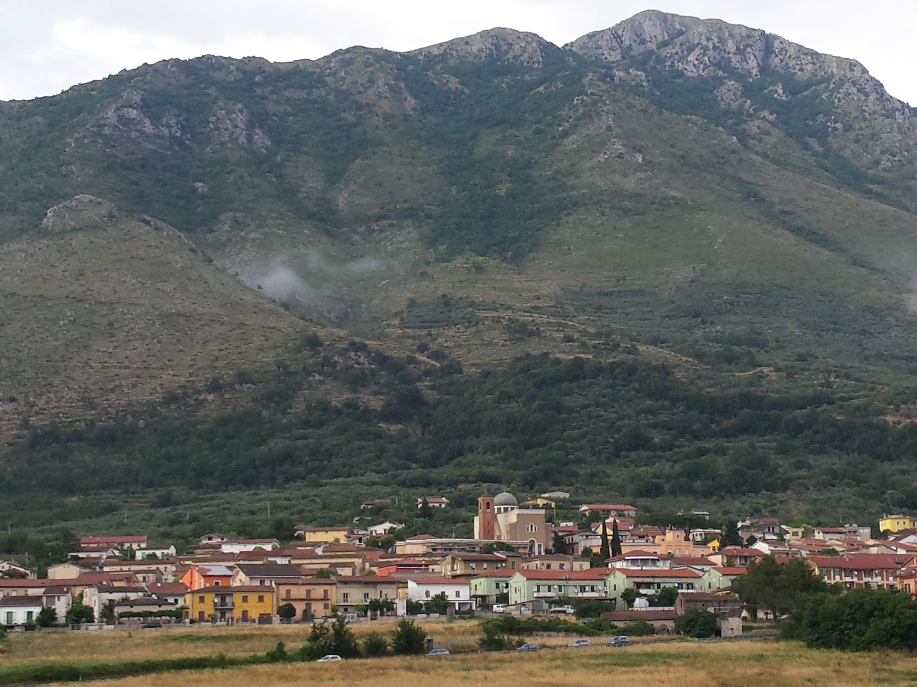 San Pietro Infine e monte Sammucro